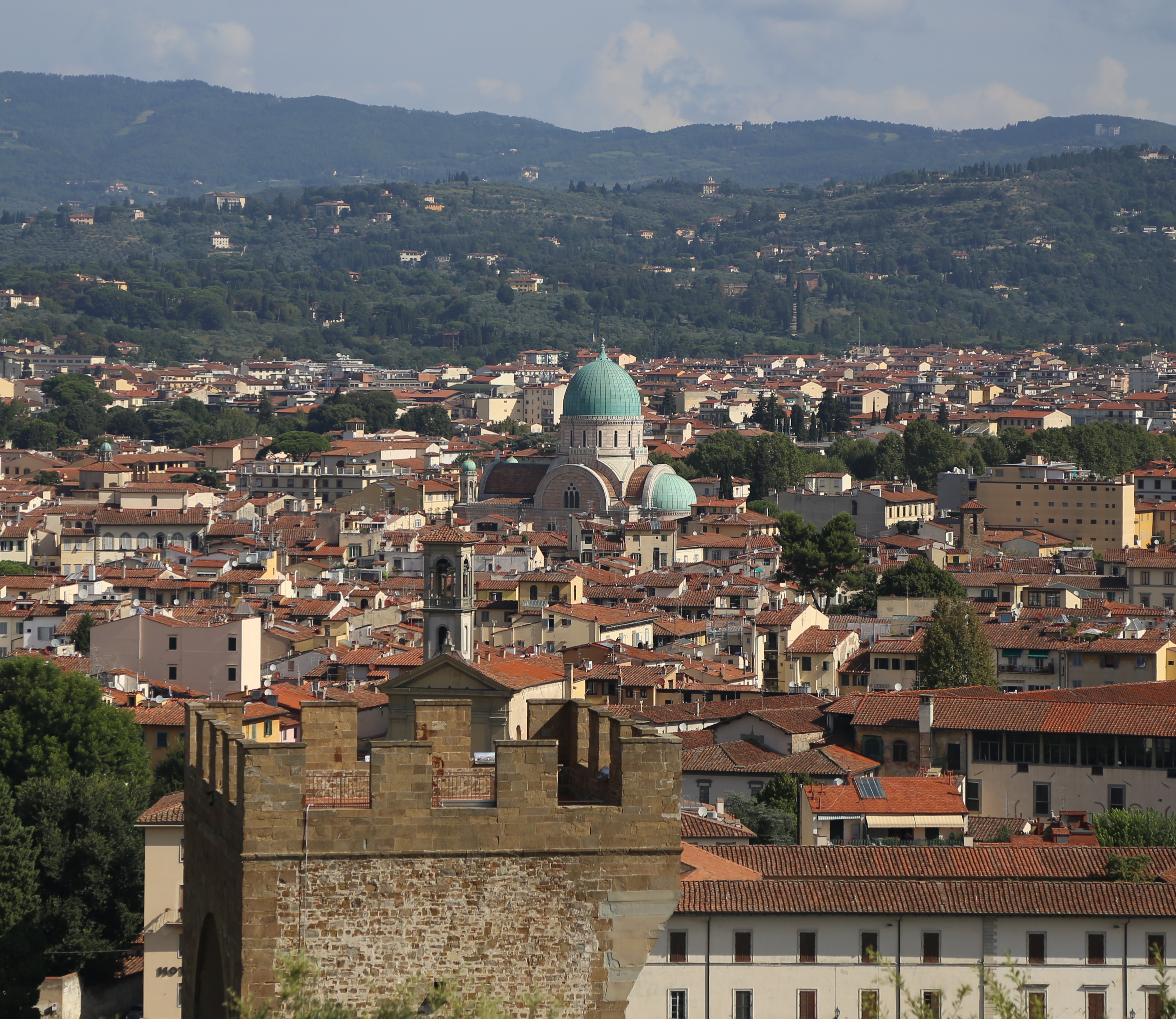 Blick vom Piazzale Michelangelo auf Florenz, Synagoge